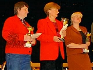 Siegerehrung der Damen, 8. Weltmeisterschaft der Senioren vom 8. bis 21. November 1998 in Grieskirchen / Österreich. Von links nach rechts: Jelena Fatalibekowa (3.), Tamar Chmiadaschwili (1.), Hanna Erenska-Radzewska (2.).